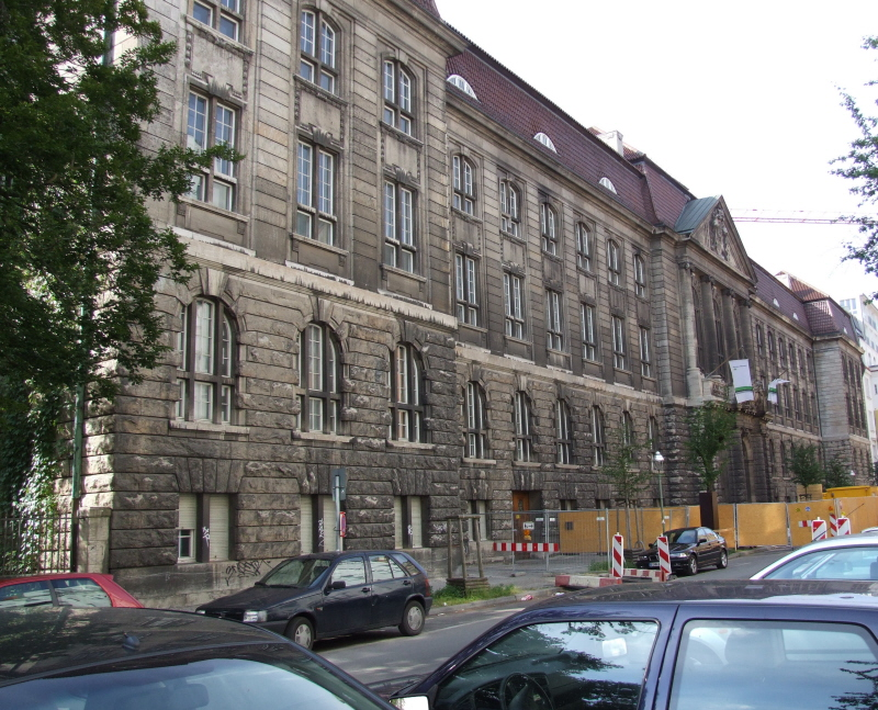 Die Fassade des Reichsmilitärgerichtes in der Witzlebenstrasse in Berlin-Charlottenburg Fotograf: Harald Rossa Dutum: Juni 2006